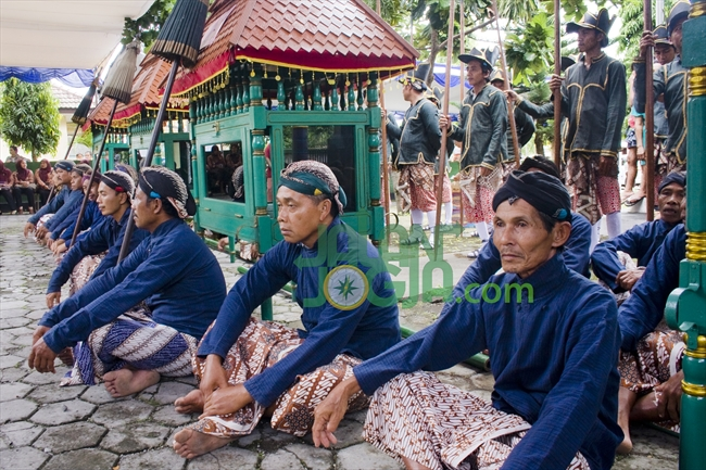 Diunduh dari .